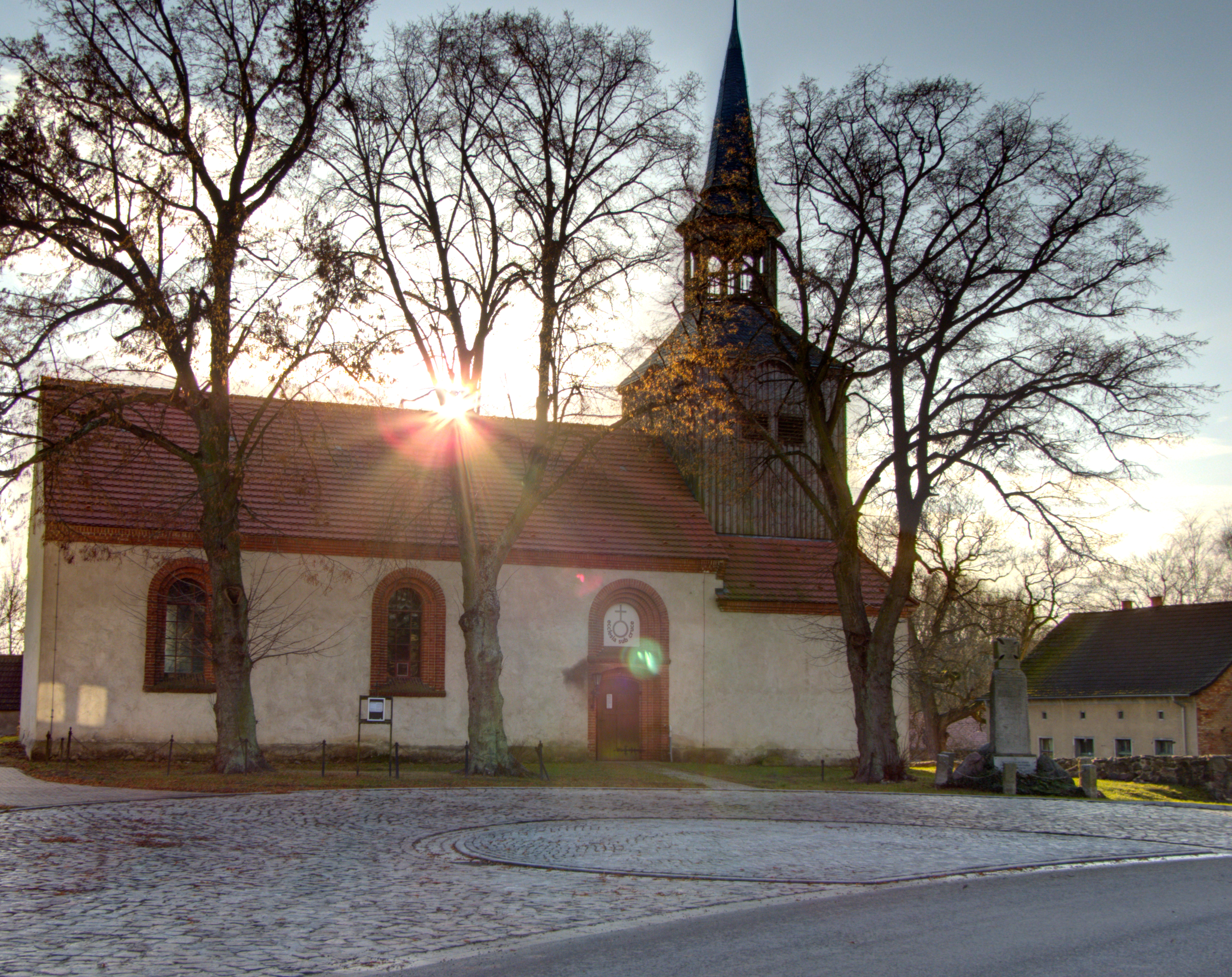 Kirche in Mescherin (Landkreis Uckermark, Brandenburg), mit Denkmal.